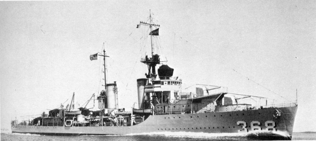 USS Flusser (DD 368).